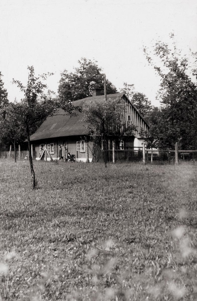 Typické stavení v Dolní Sytové (součást Hájů nad Jizerou), asi v 50. letech